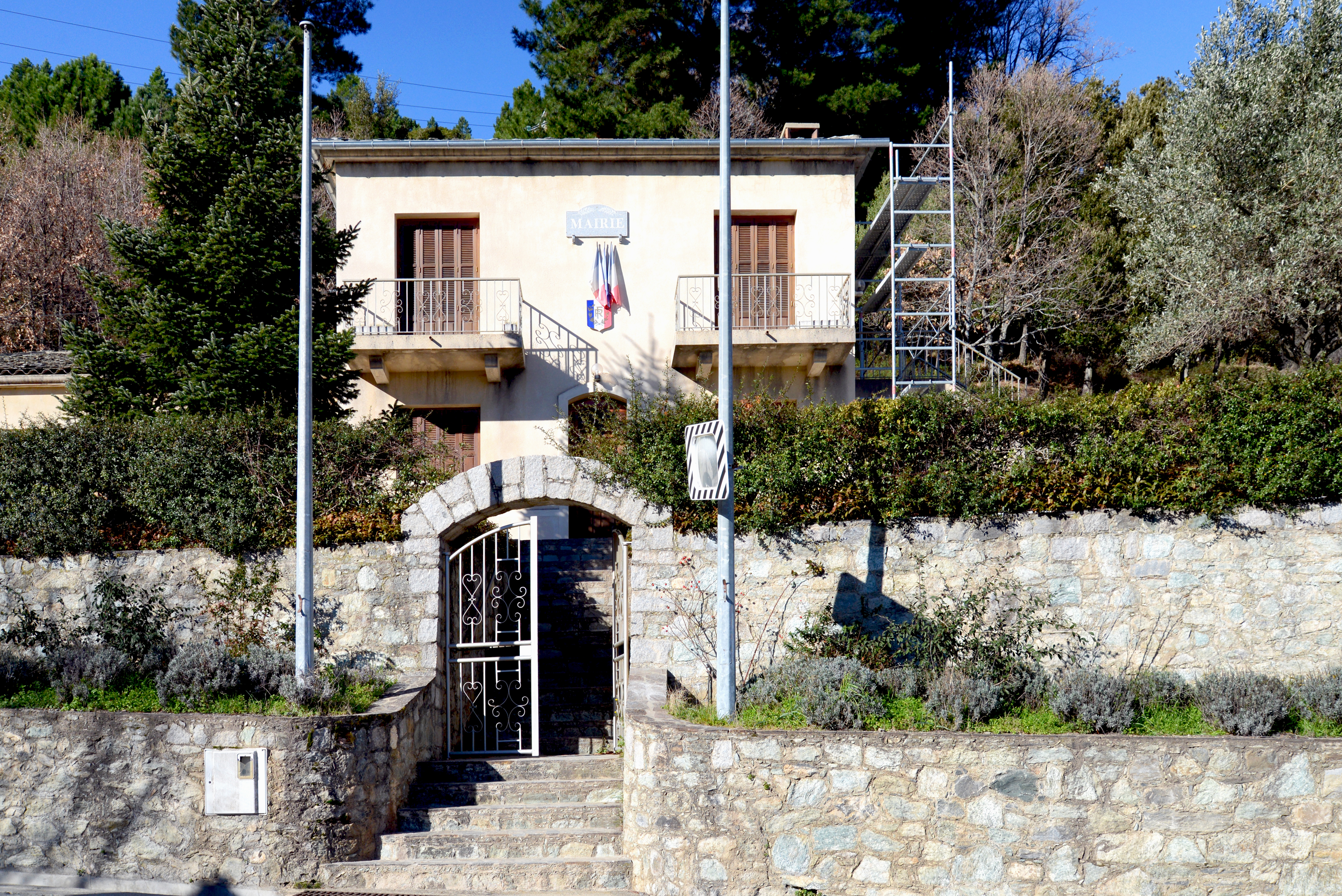 Rospigliani, Rogna (Haute-Corse) - La mairie à Vignaccia.